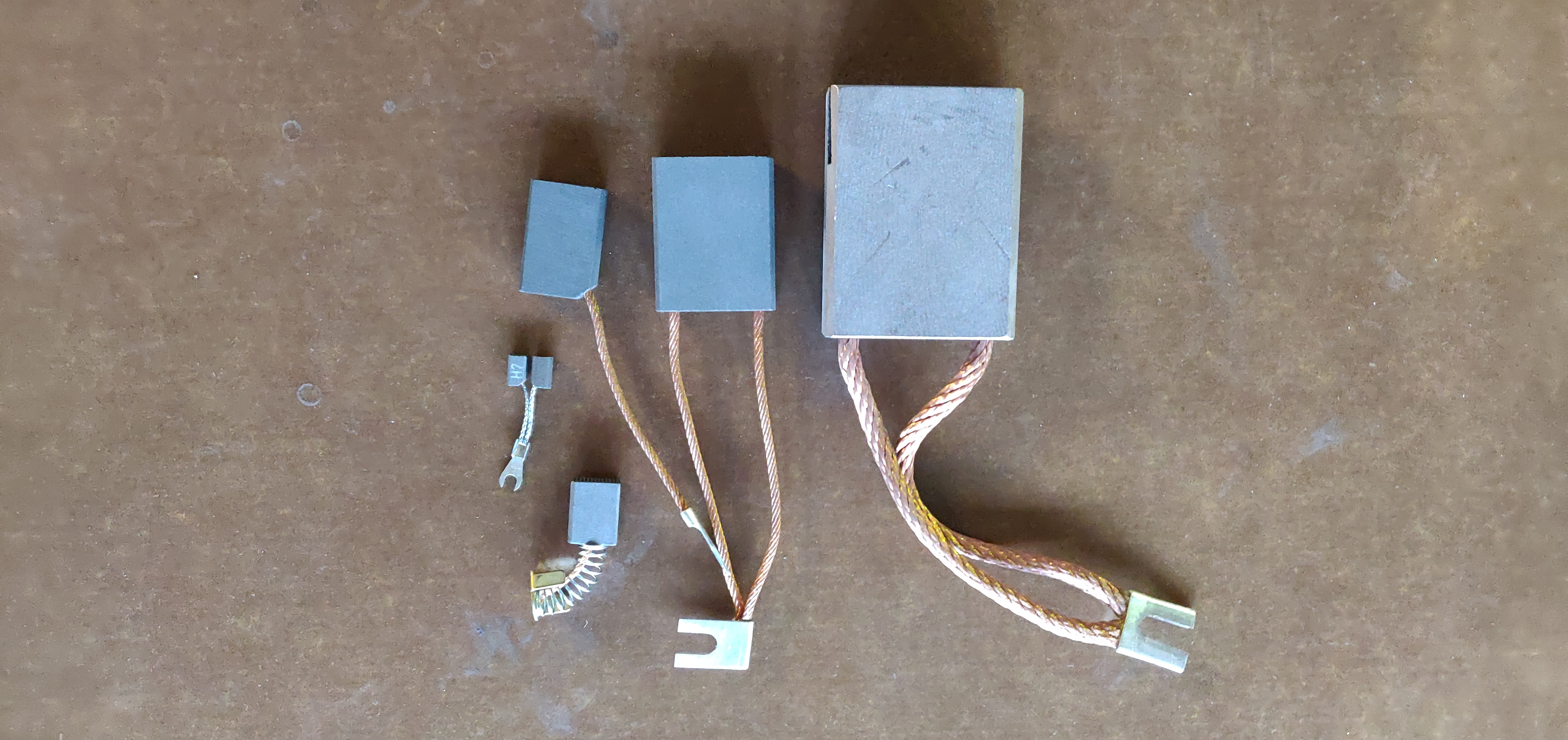 Motor brushes, different sizes.